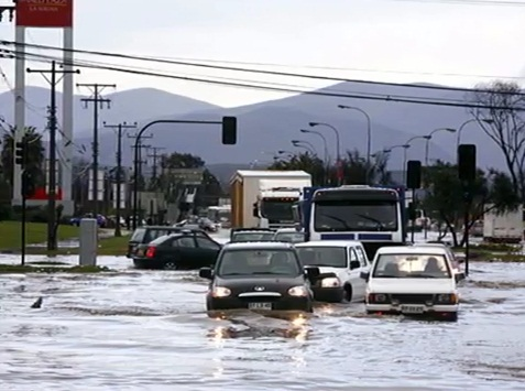 Ruta 5 Norte 6 de junio de 2011 en La Serena